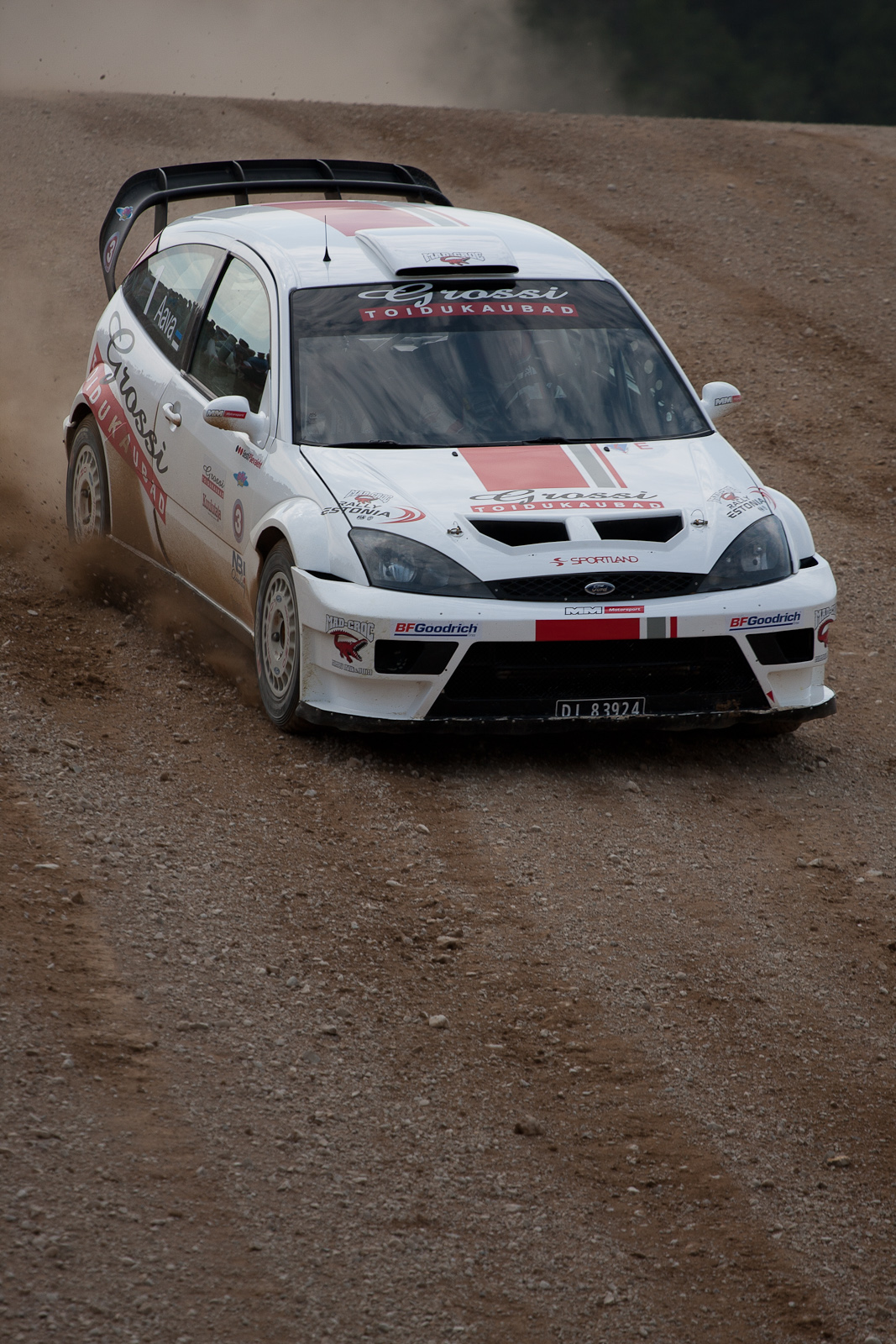 Kehala Rallisprint 2010